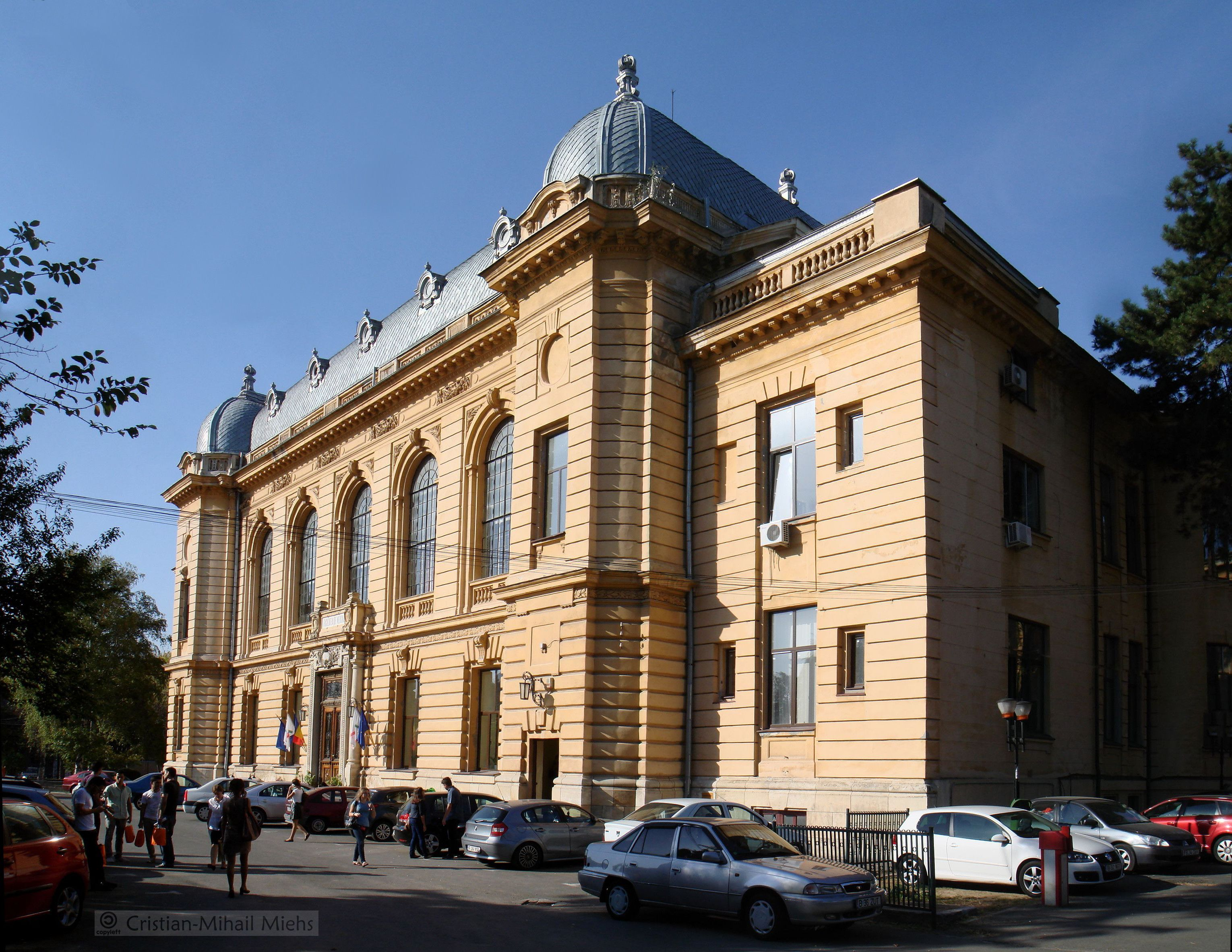 Fosta Facultate de Medicină, azi Universitatea de Medicină și Farmacie, intrarea laterală